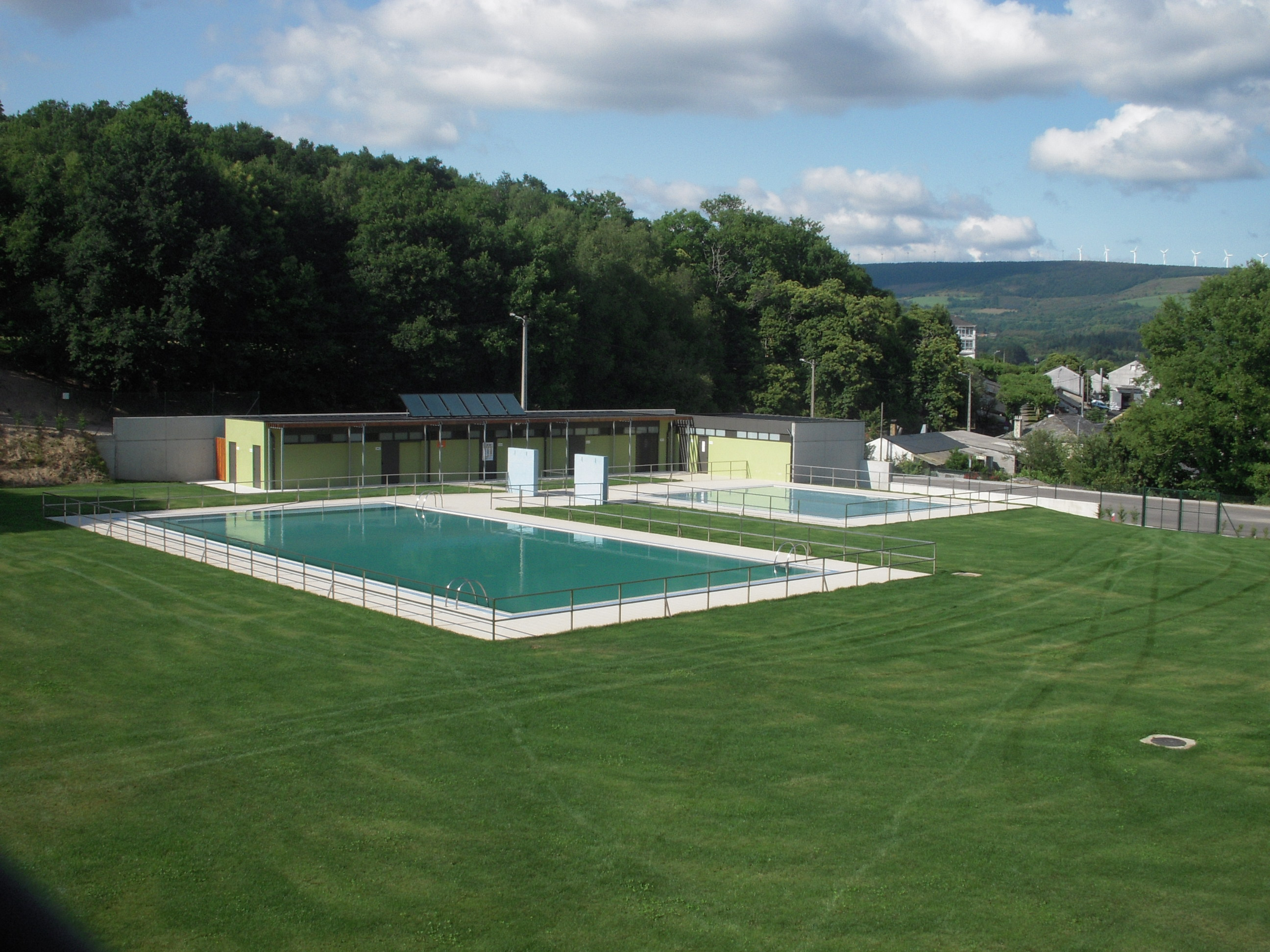 Piscinas Municapales fundadas en Julio de 2010